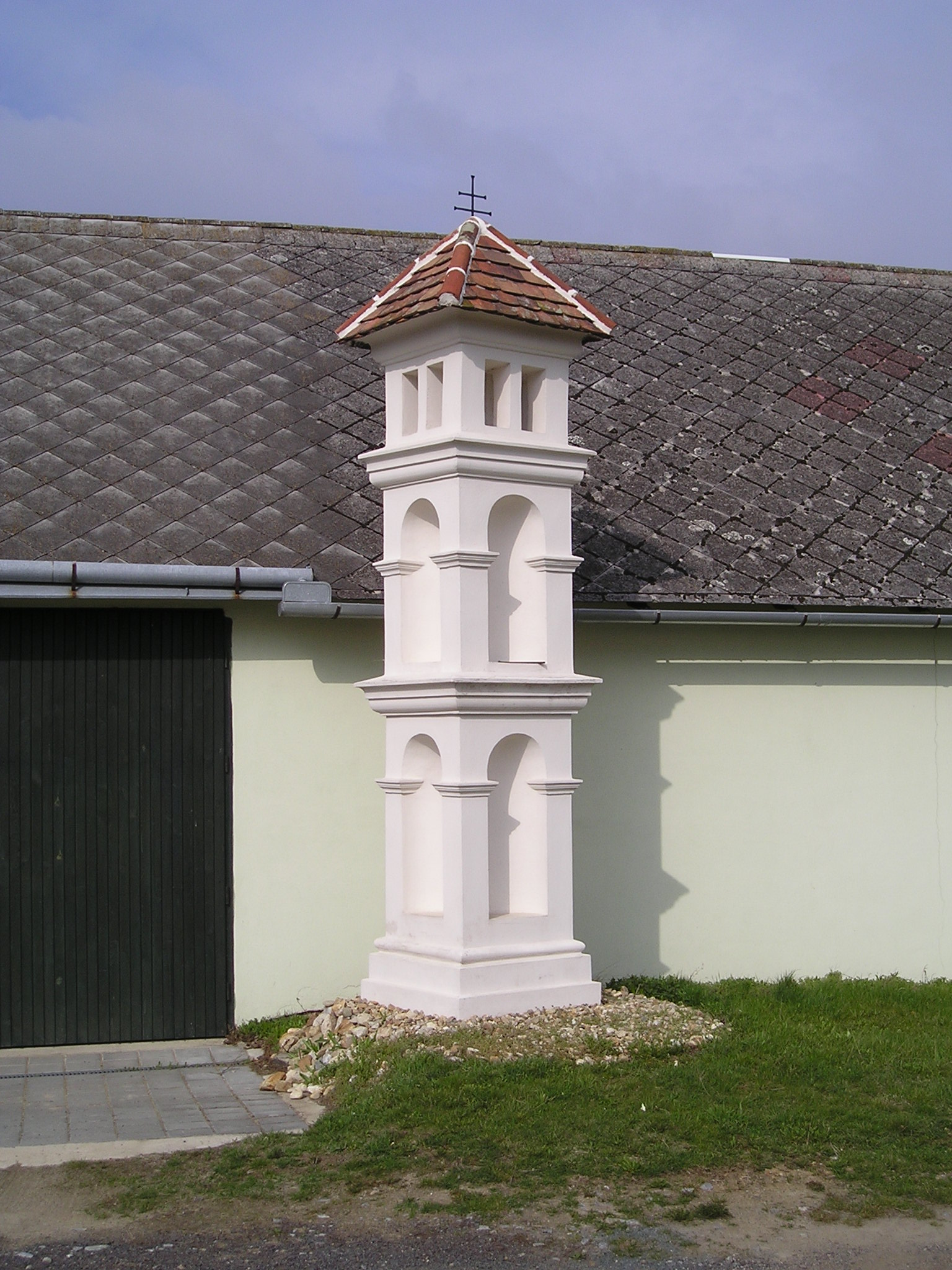 Boží muka (Pavlice), při silnici do Boskovštejna, Pavlice